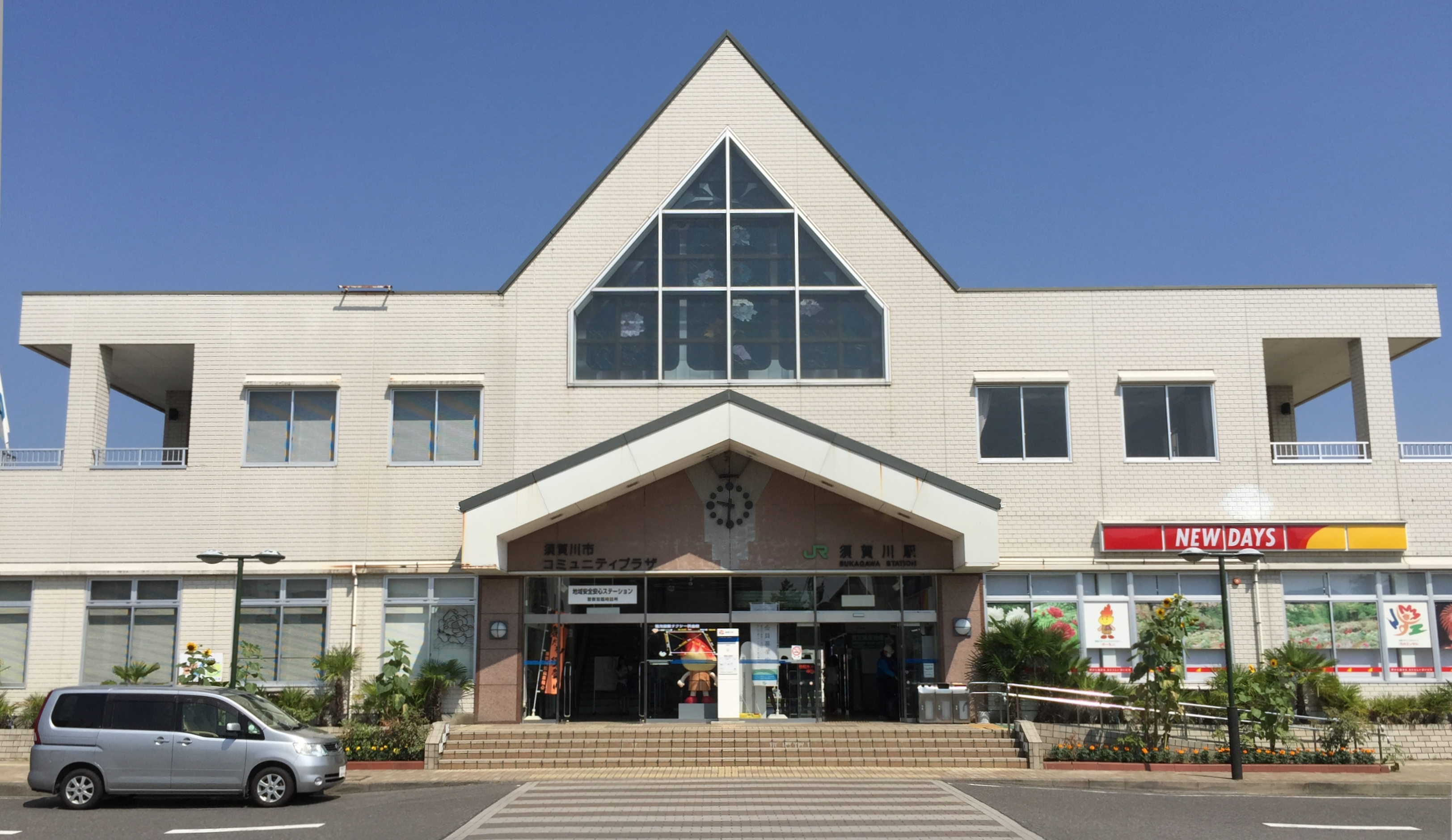 須賀川駅駅舎